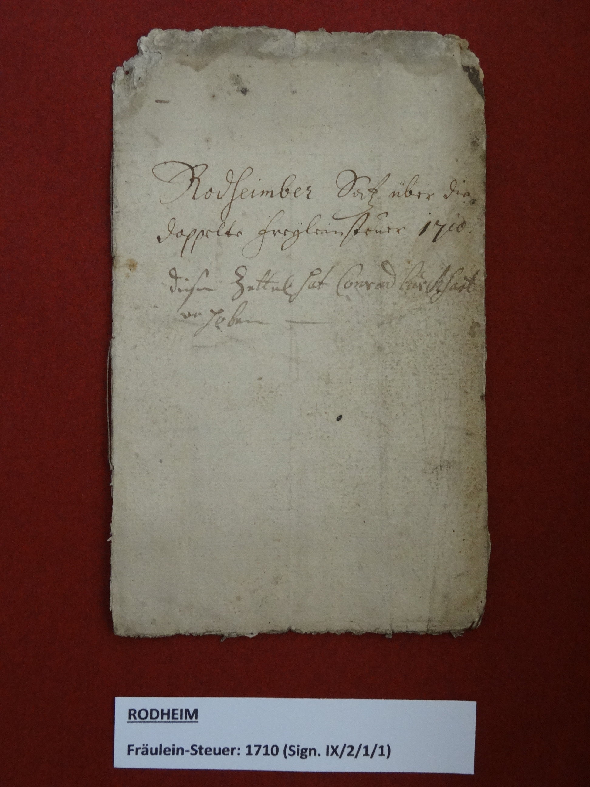 Stadtarchiv Hungen